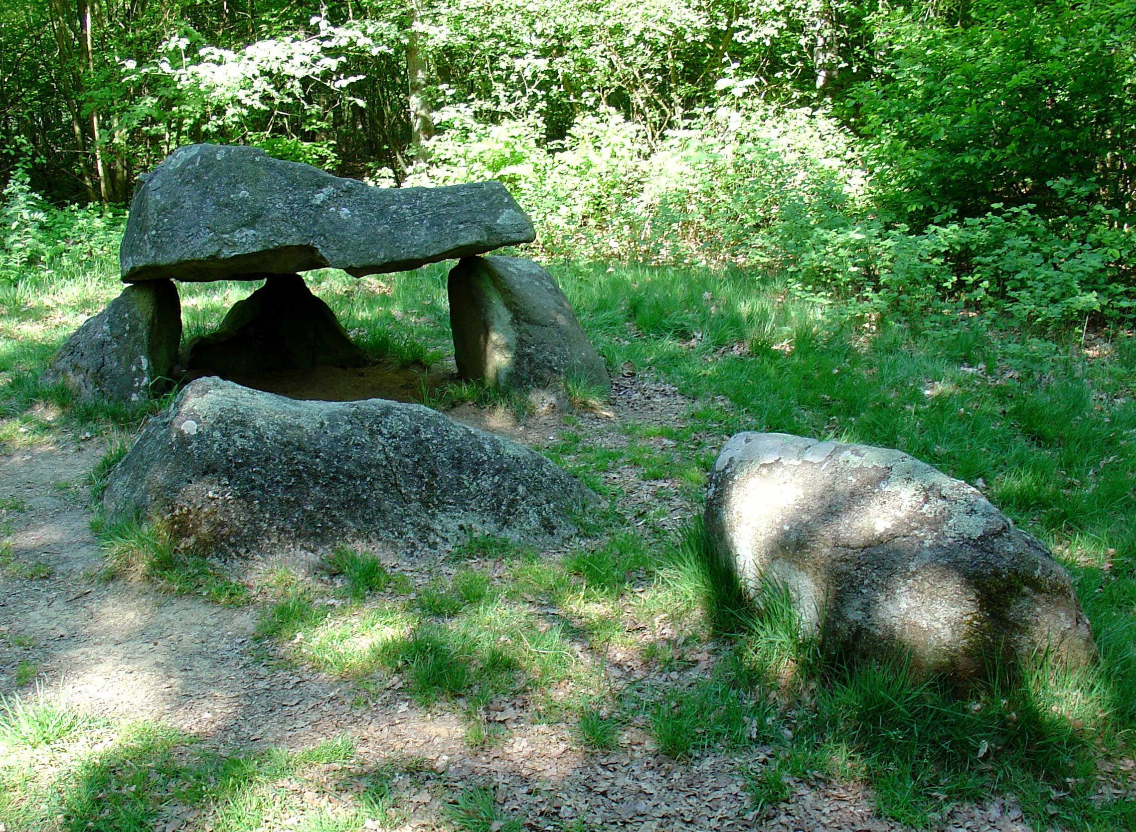 Hunebed D23 nabij Bronneger